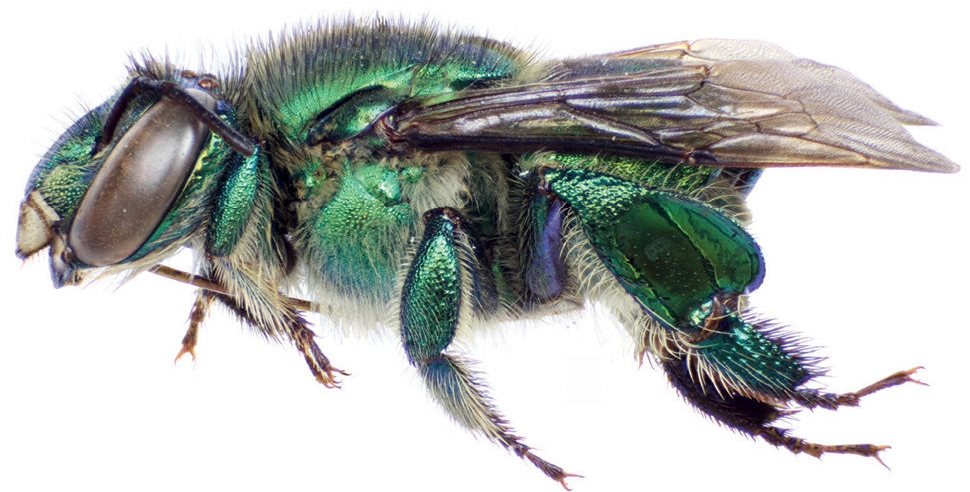 Euglossa obrima female, paratype